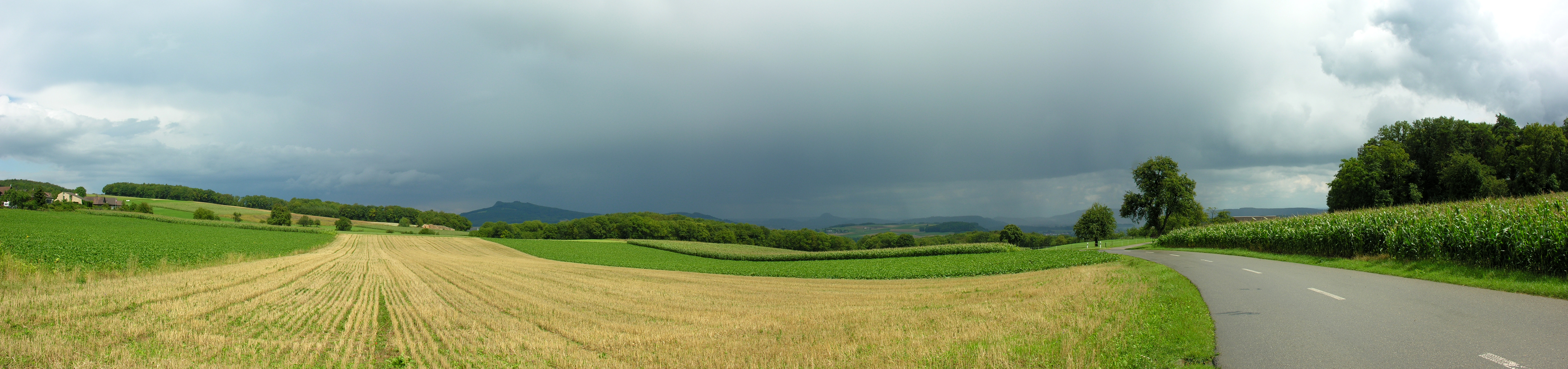 Lohn